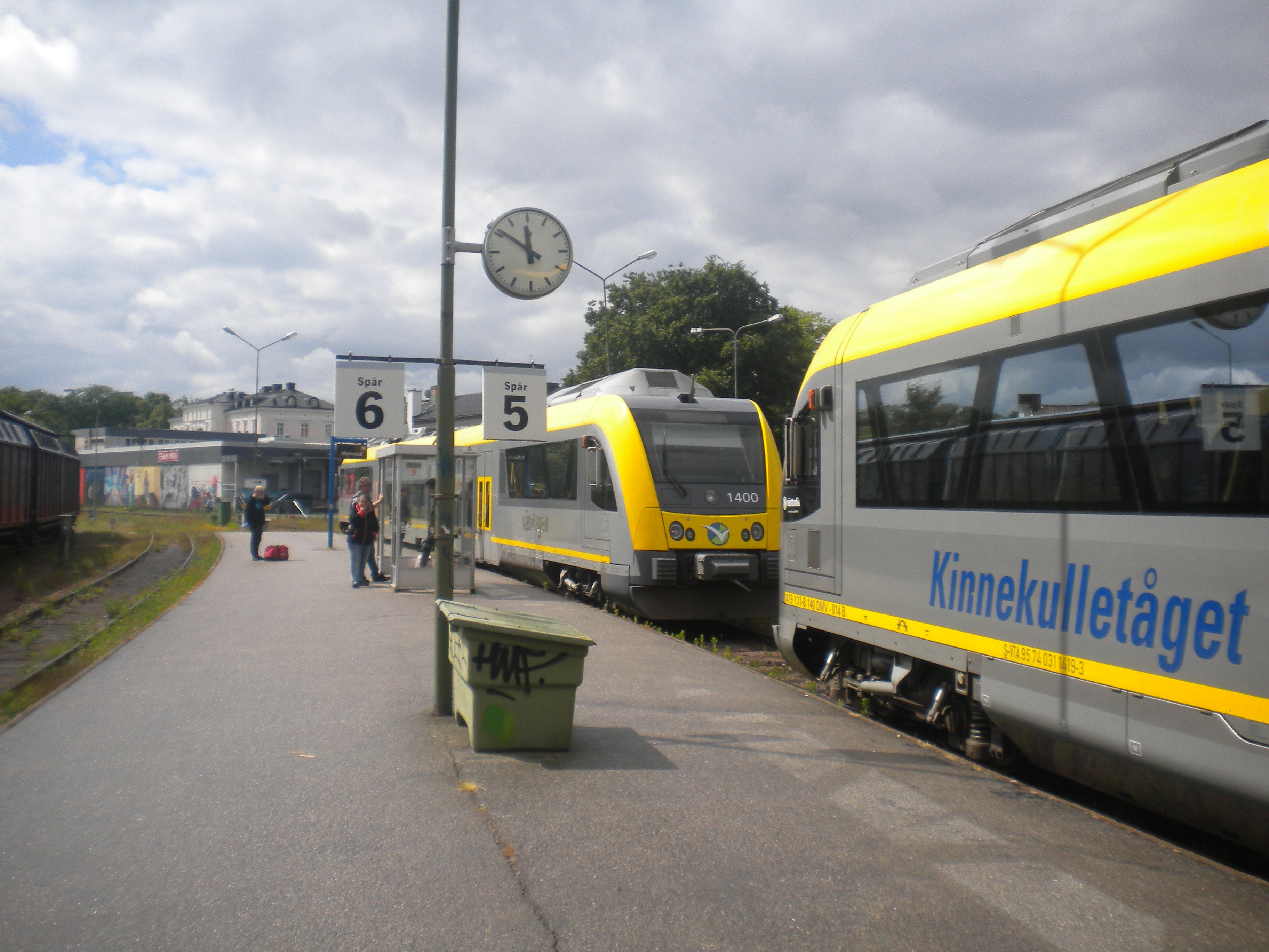 Västtrafiks Y31 1400 (längst bort i bilden) inväntar avgång 12:21 med tåg 3361 mot Lidköping och Herrljunga. Närmast i bilden syns Västtrafiks Y31 1419 som just inkommit några minuter tidigt med tåg 3359 från Hallsberg, ordinarie ankomsttid är 11:52, rälsbussen skall senare avgå tillbaka mot Hallsberg. Längst bort till vänster i bilden skymtar vagnar ur Green Cargo:s godståg.